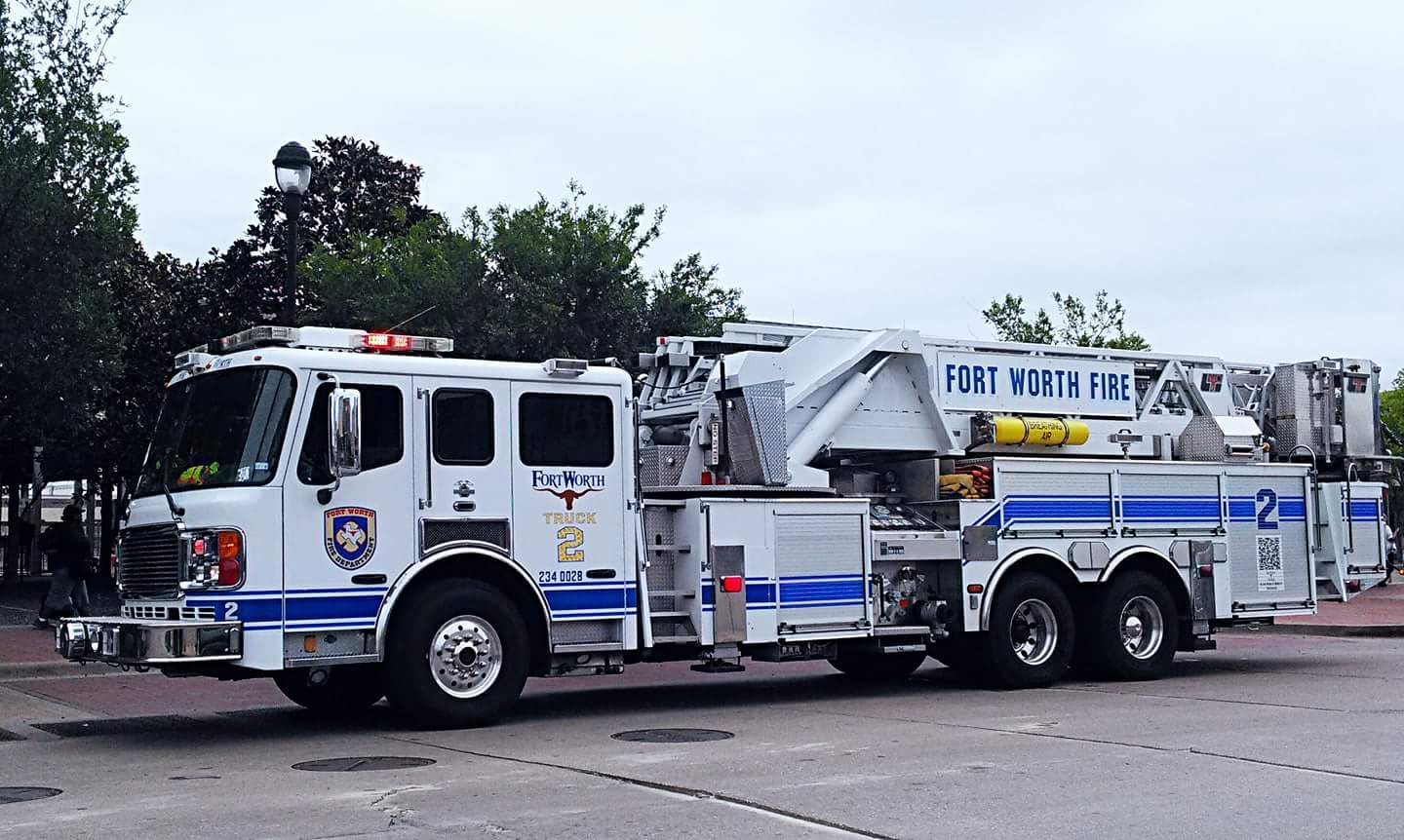 FWFD Truck 2